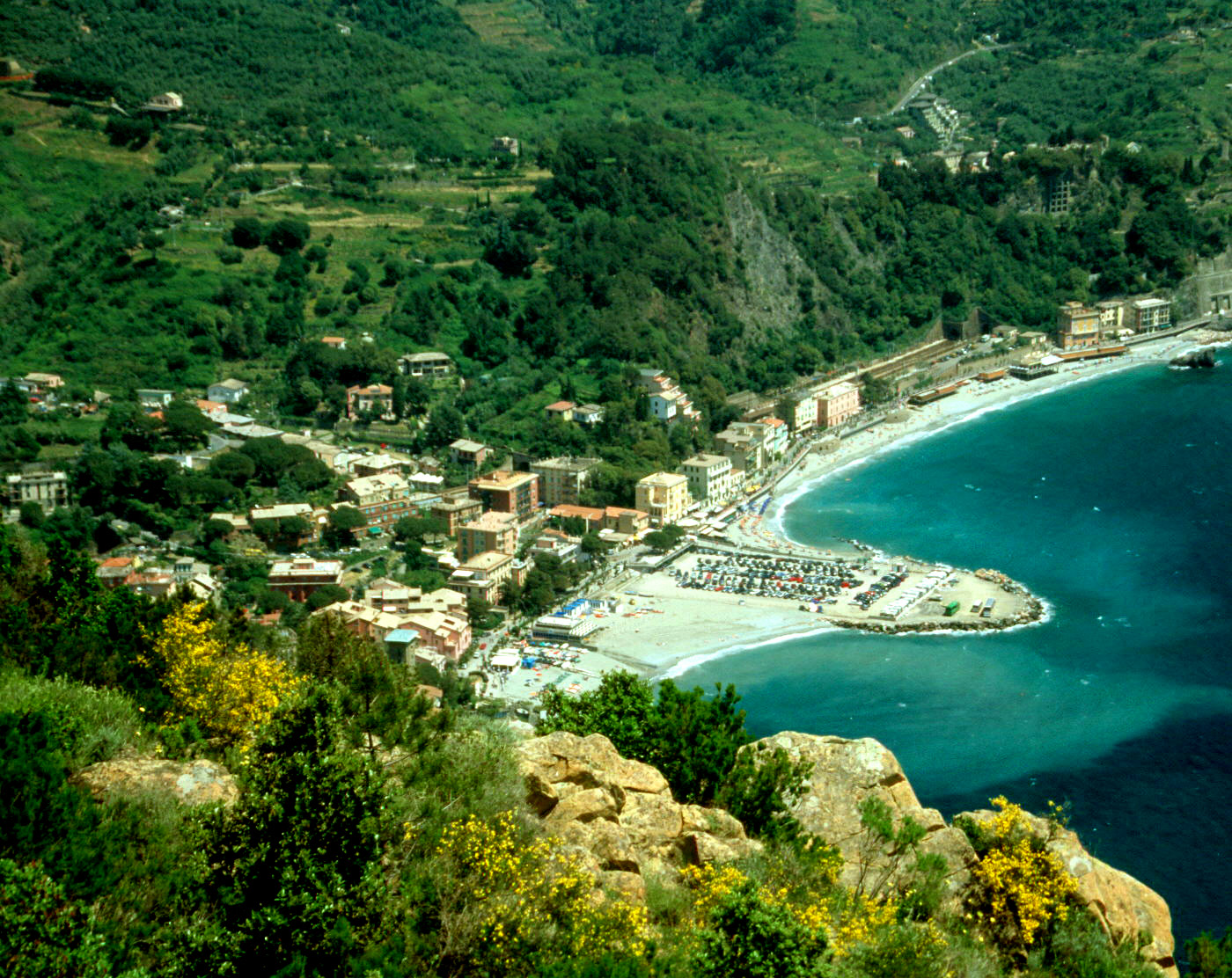 Monterosso 2004